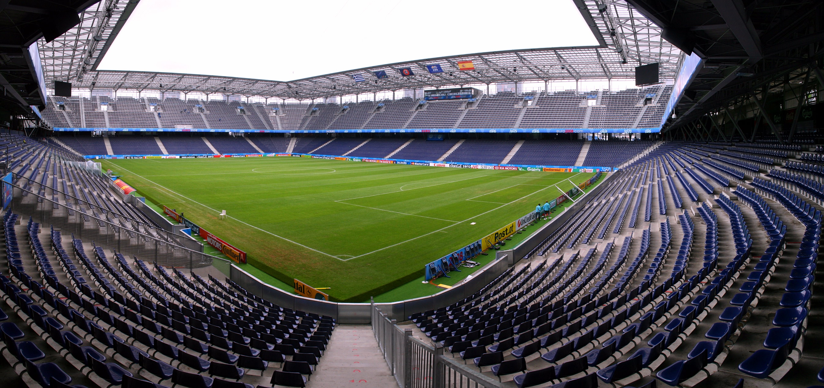 Das EM-Stadion Wals-Siezenheim während der Fußball-Europameisterschaft 2008